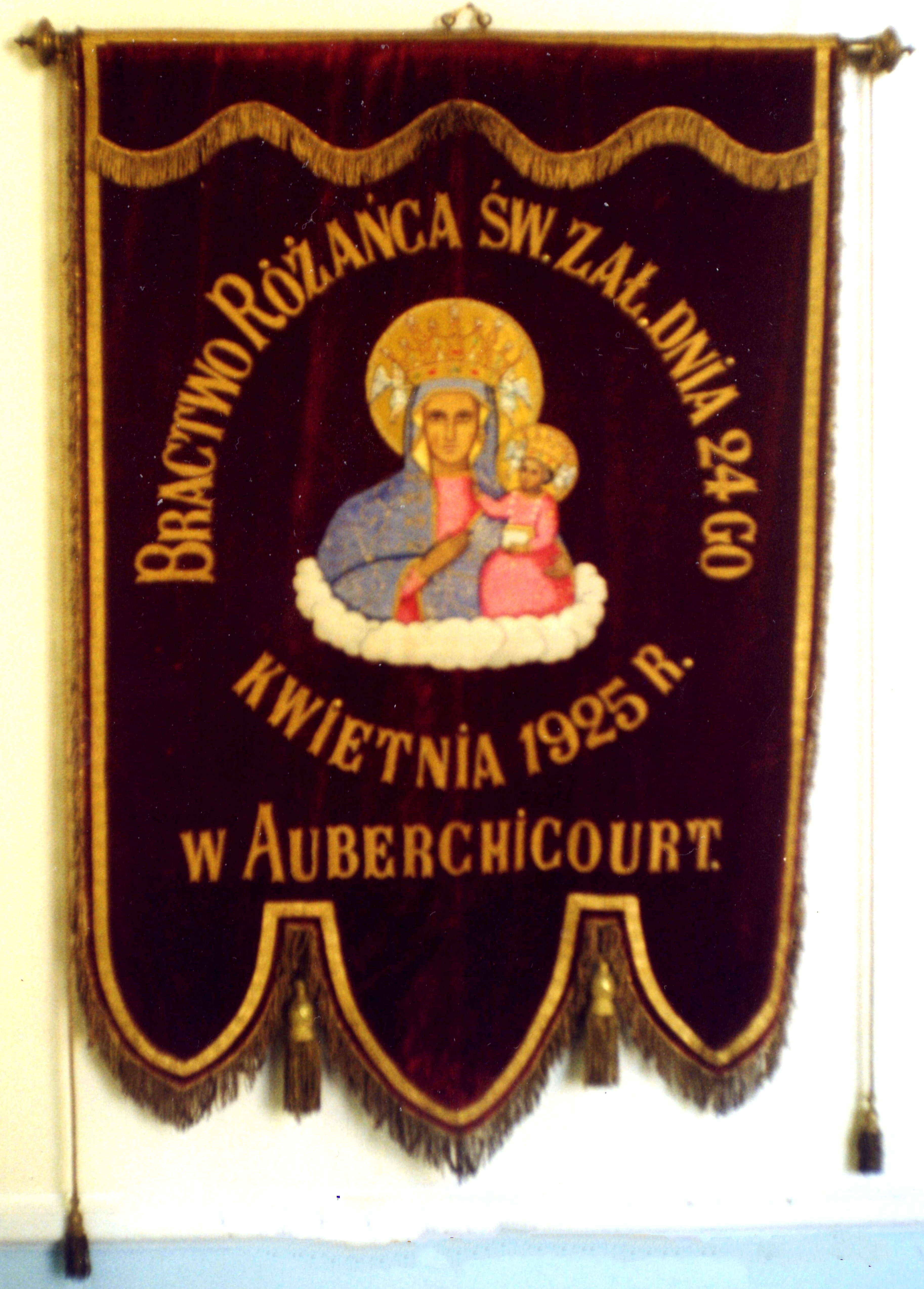 Bannière de la Confrérie polonaise du Rosaire à Auberchicourt (1925), diocèse de Cambrai. Se trouve en Pologne à Bydgoszcz (Poméranie) au Musée de la Diplomatie et de l'Émigration Polonaise. Cote VII/1. (Syg. VII/1.- Sztandary i Chorągwie)